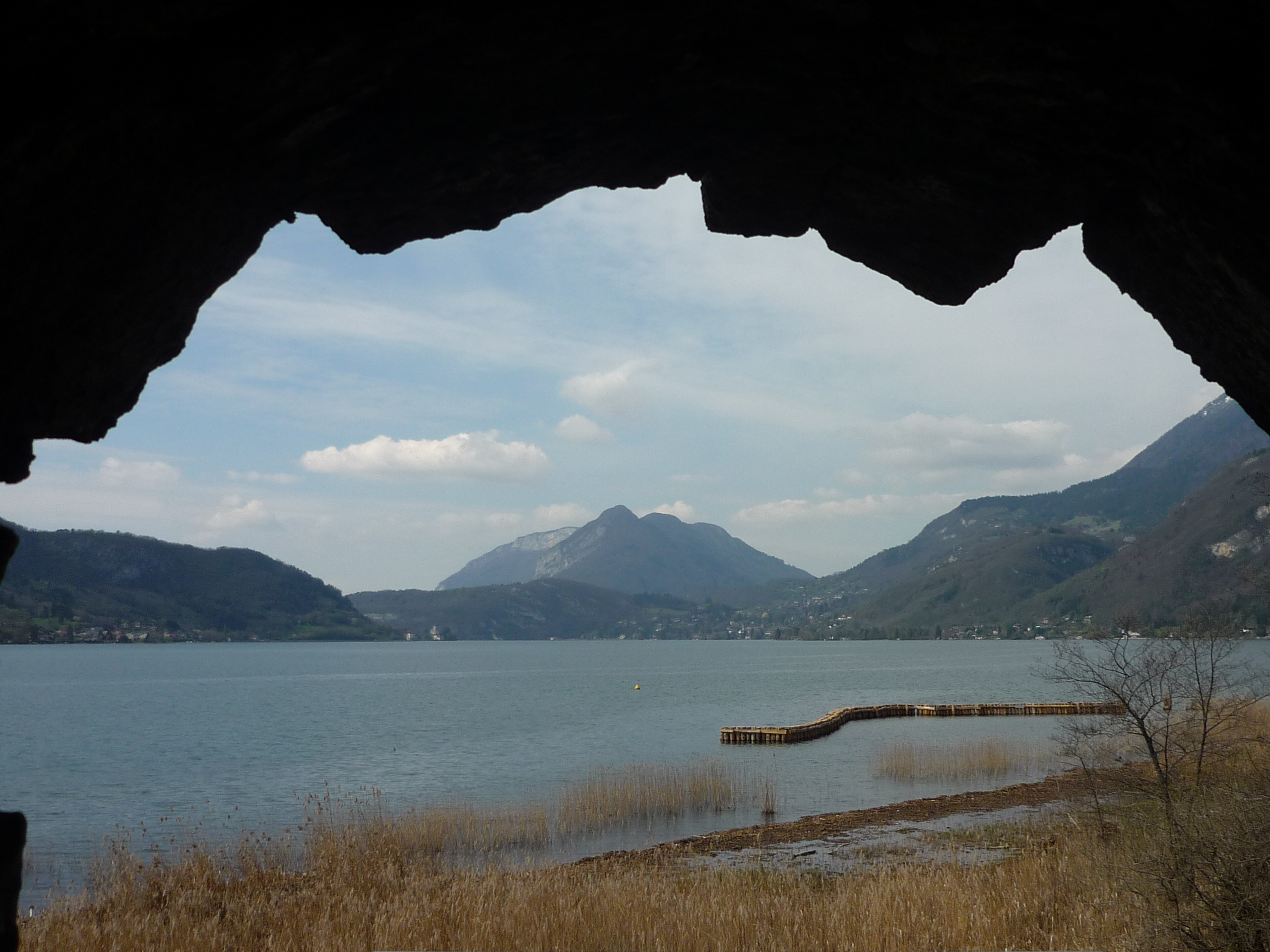 Réserve naturelle du Bout-du-Lac, Doussard, Haute-Savoie, France